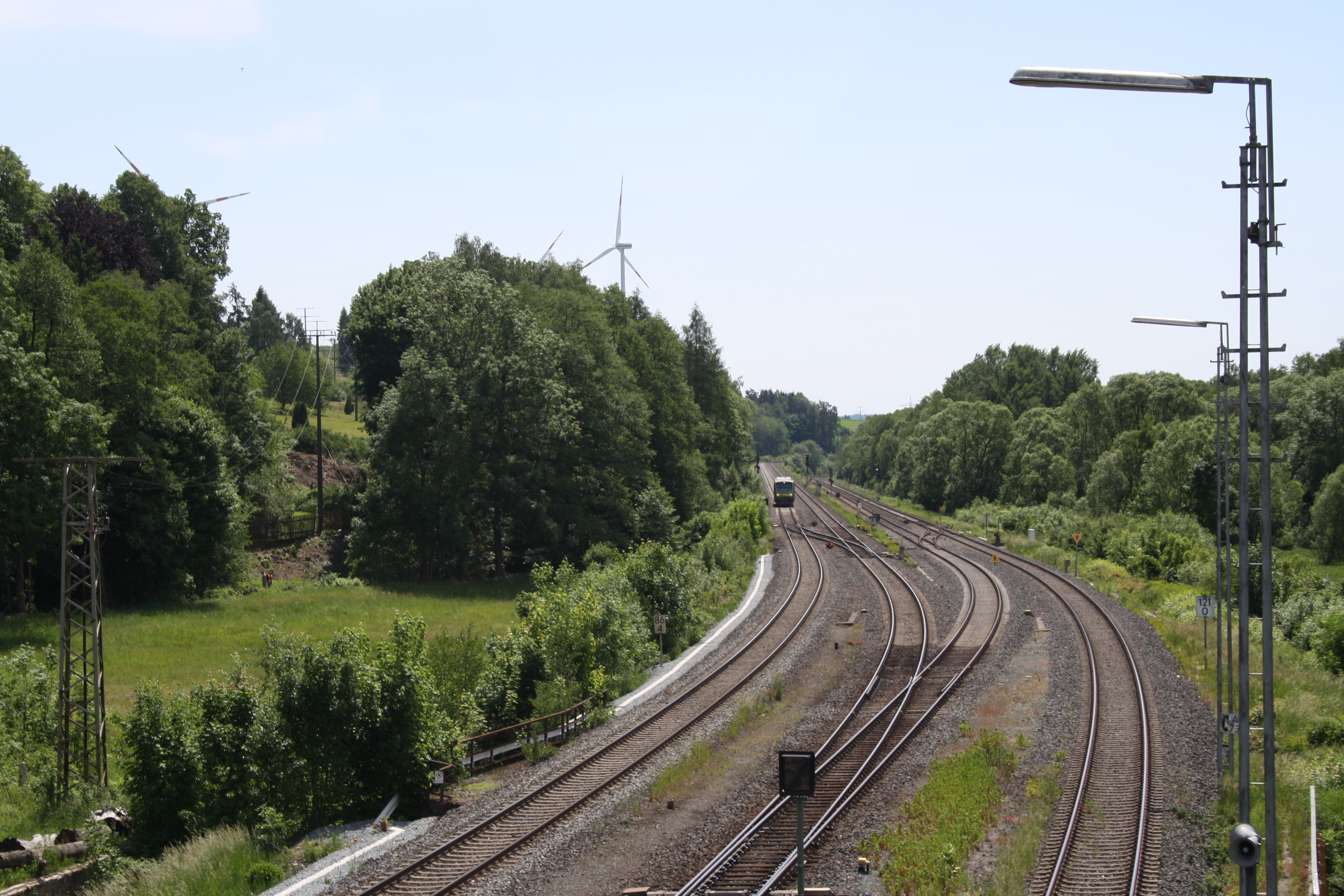 Streckentrennung in Oberkotzau